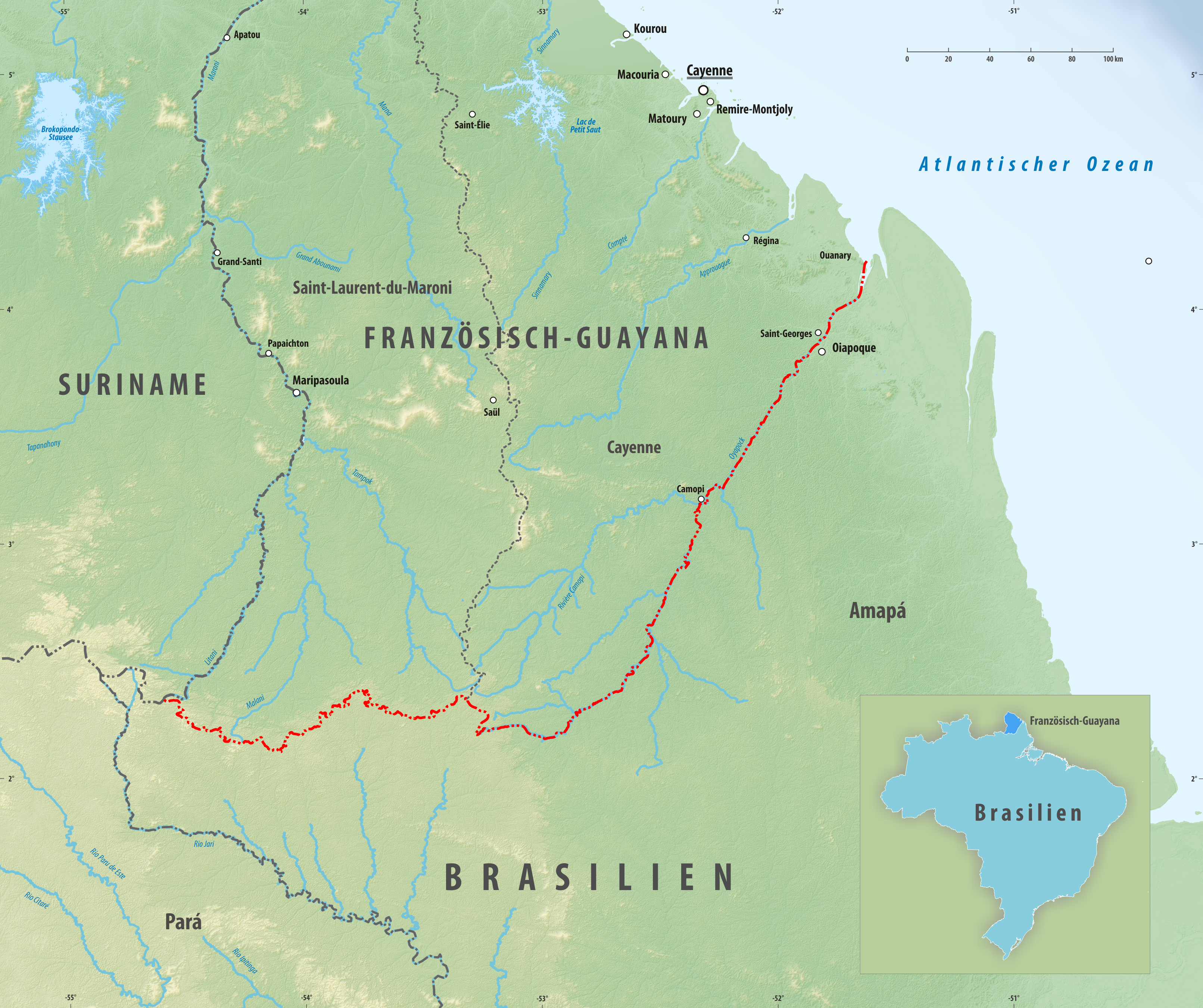 Reliefkarte des Grenzverlaufes zwischen Frankreich (Französisch-Guayana) und Brasilien Topographischer Hintergrund: NASA Shuttle Radar Topography Mission (public domain). SRTM3 v.2.